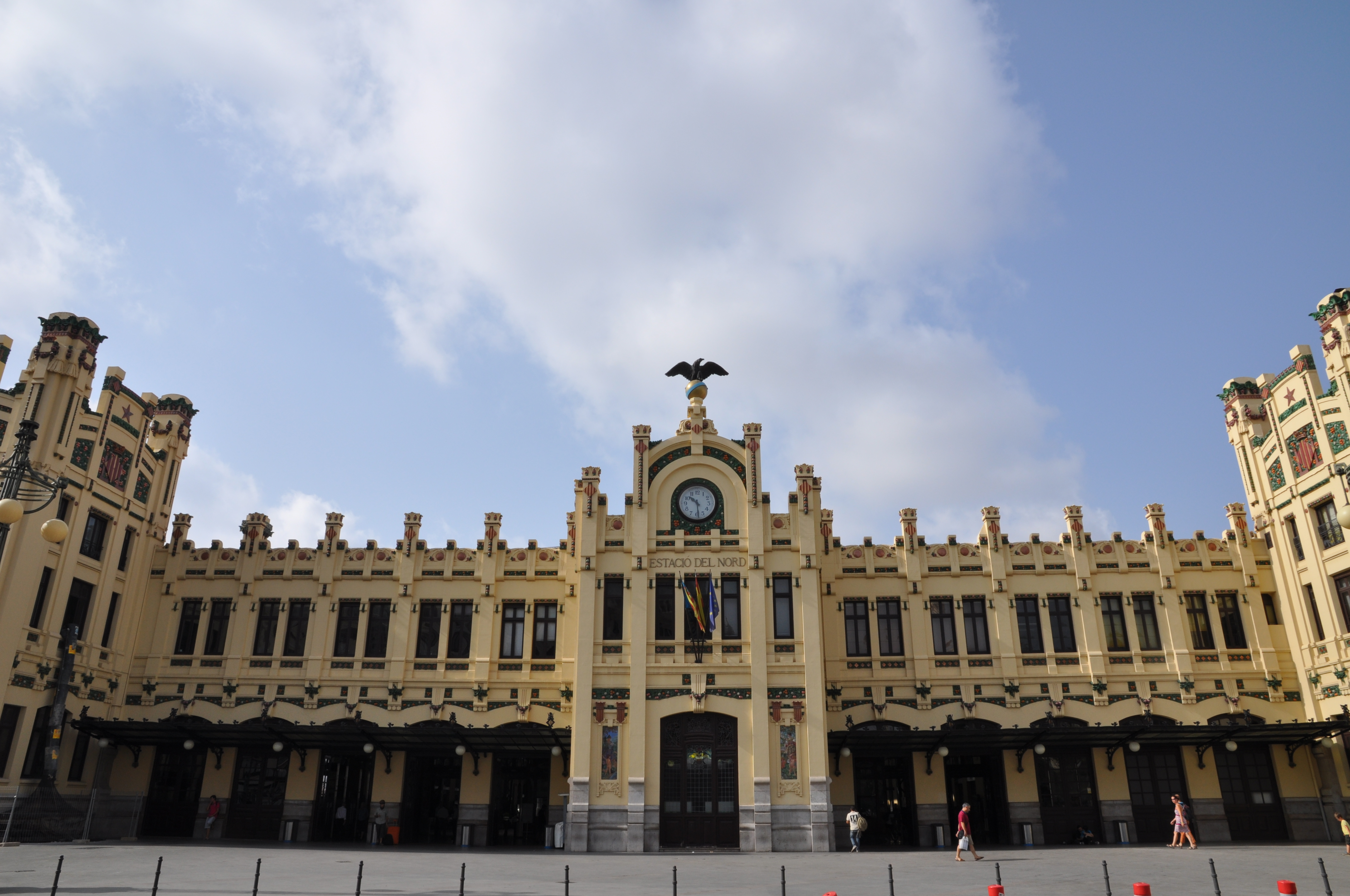 Estació del Nord de València exterior Nedersaksies: Stationne van Valencia in Spanje.